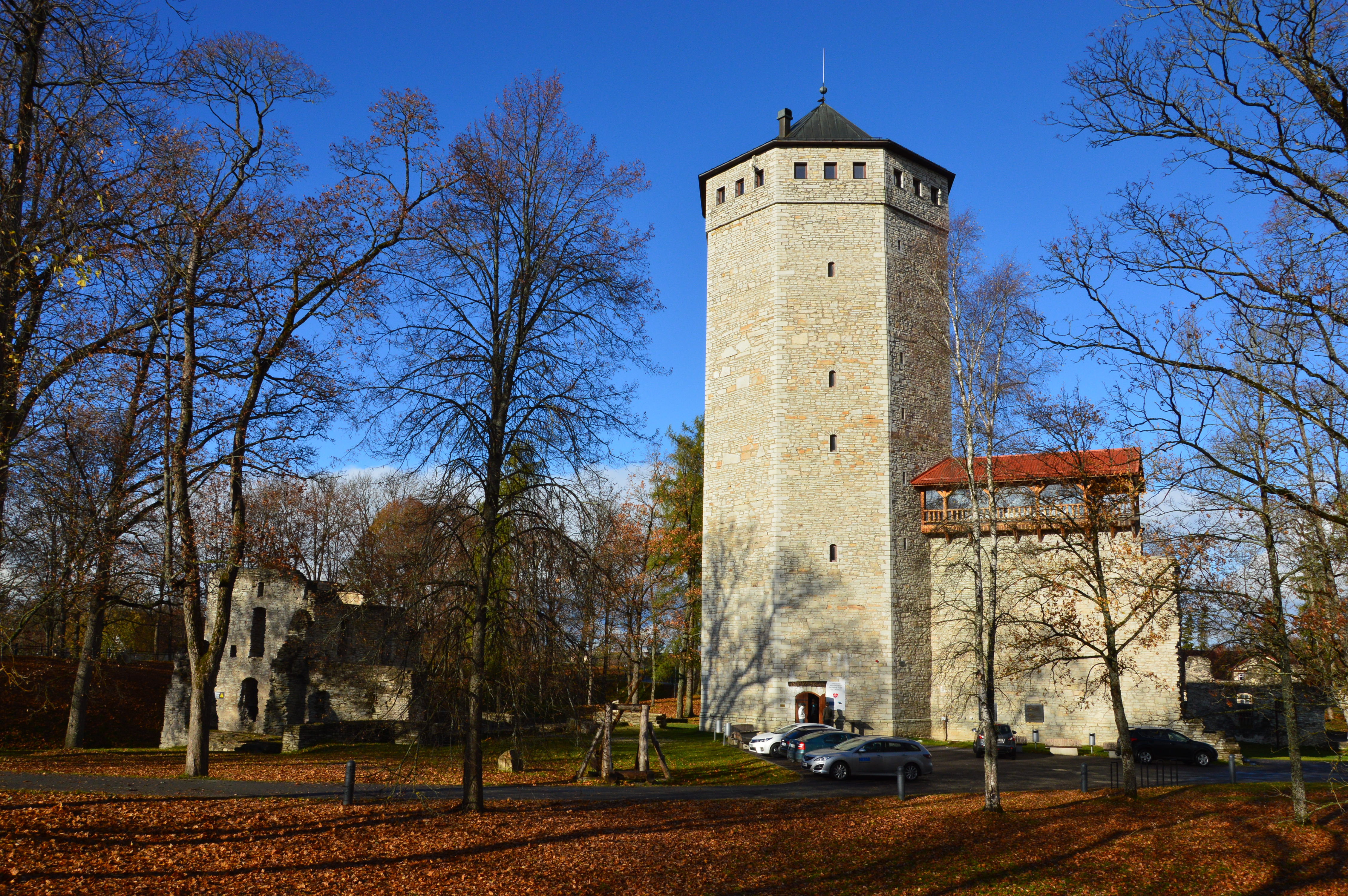 Paide Vallitorn